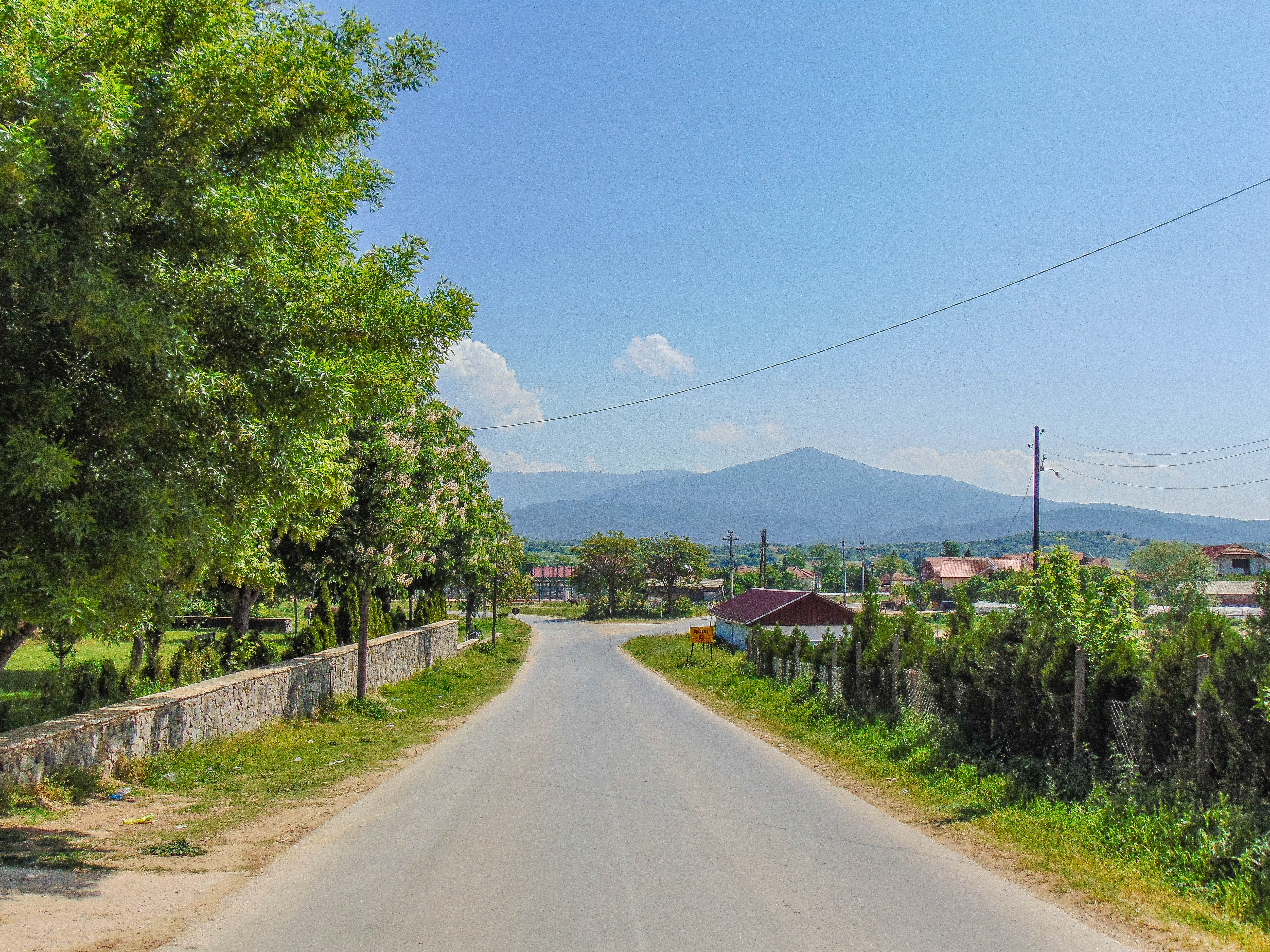 Ораовица